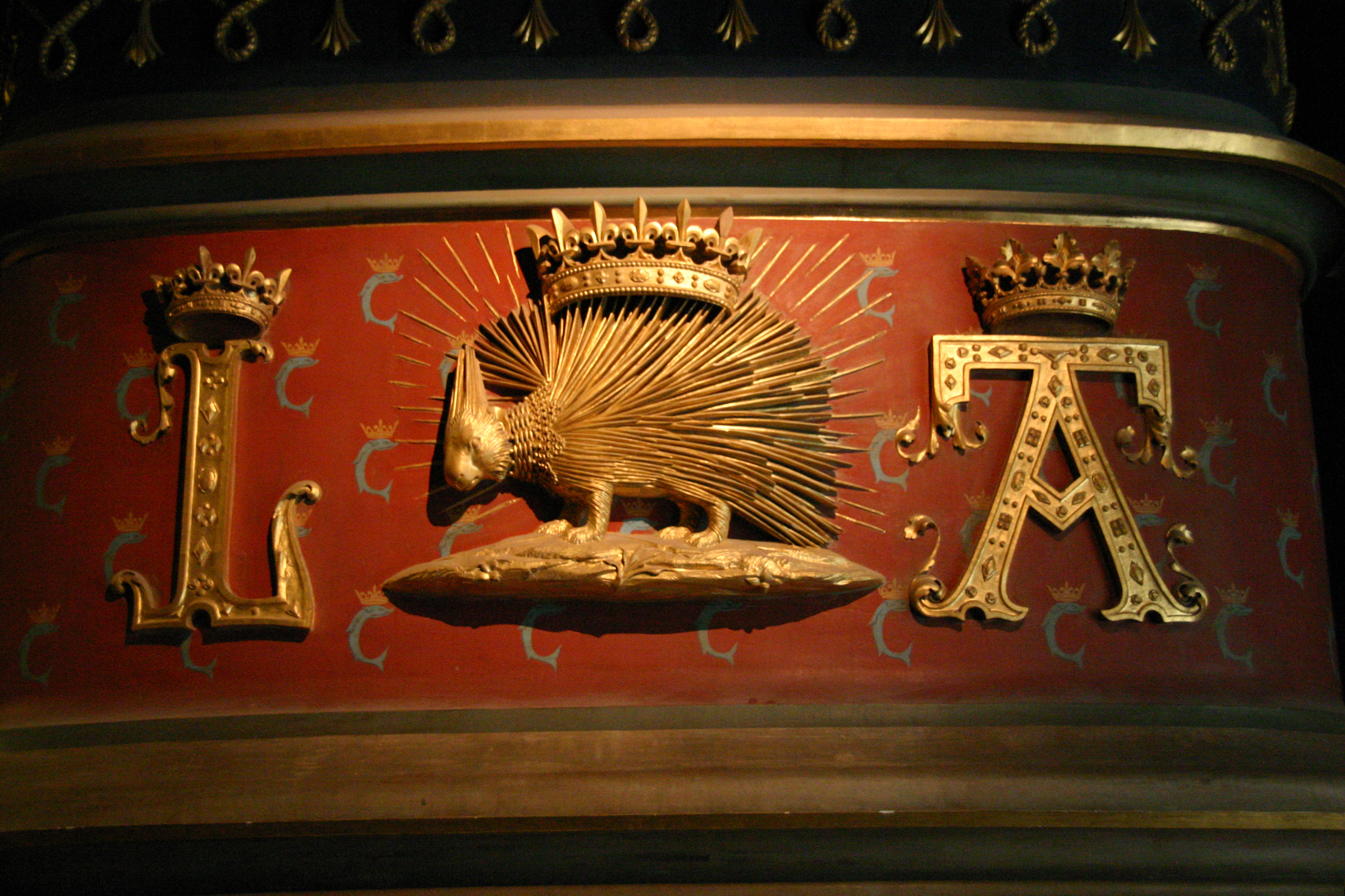 Château de Blois innen